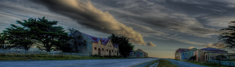 Panoramica de la antigua Estancia San Gregorio fundada a fines del siglo XIX, sobre la costa del Estrecho de Magallanes, en Chile.